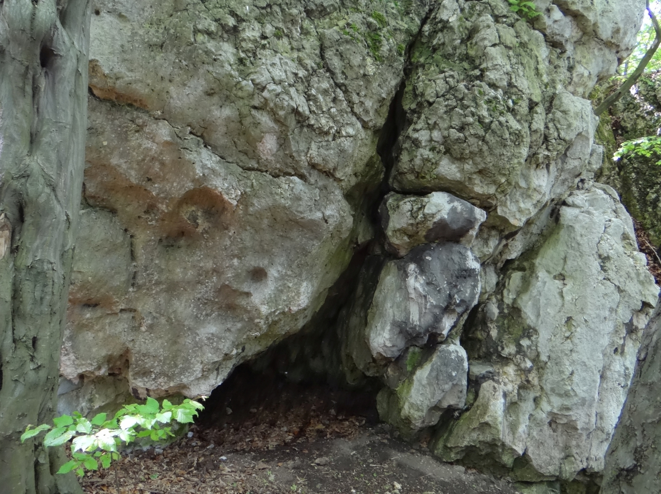 Jaskinia między Schronami